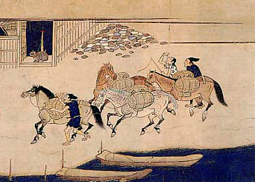 Басяку (Исияма Энгимаки)